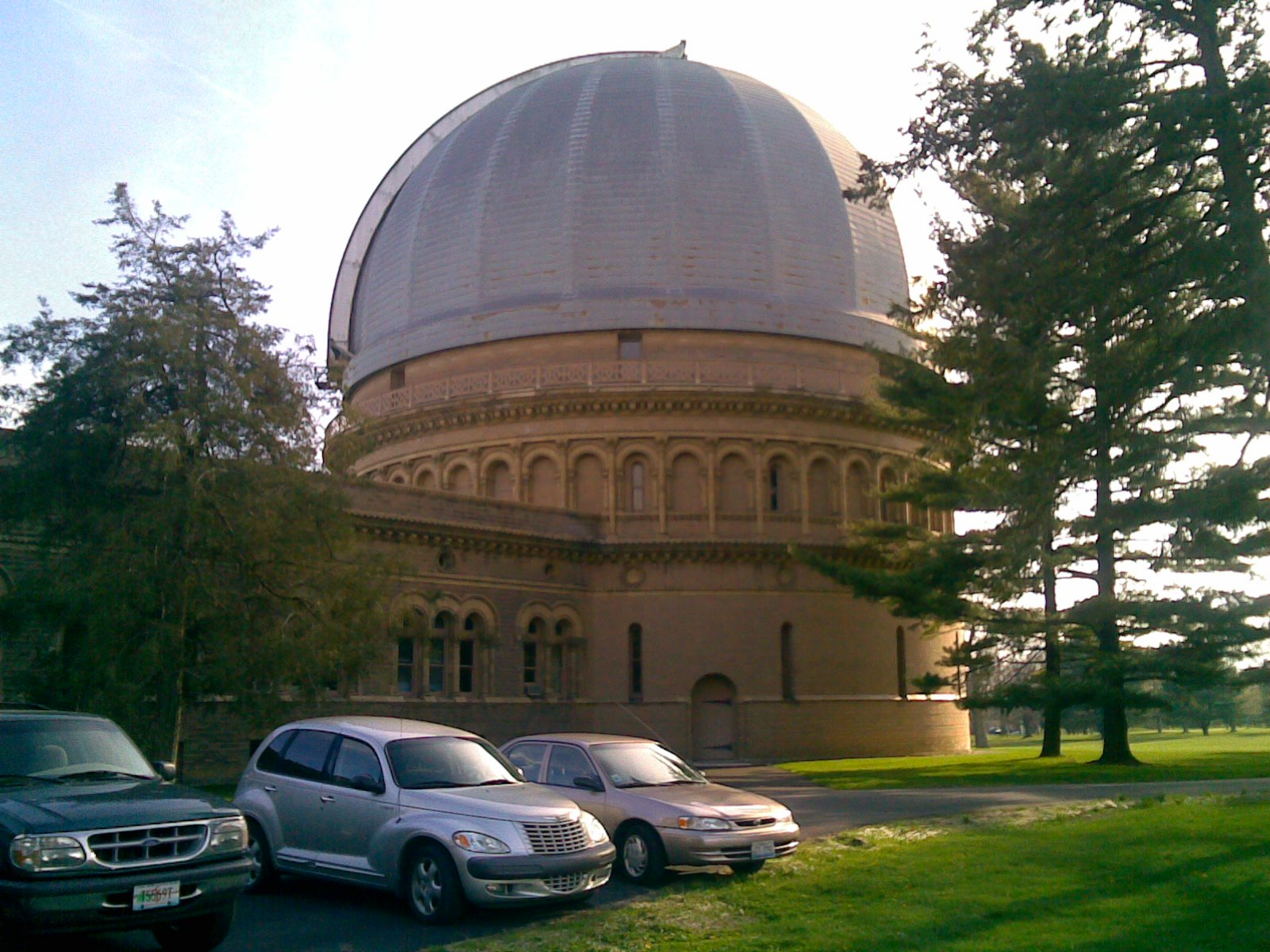 YerkesObserwatory20